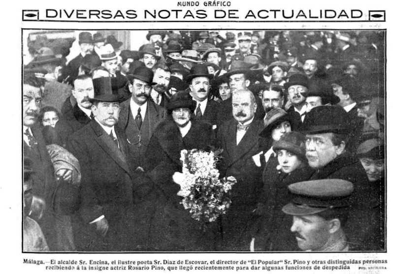 El alcalde Sr. Encina, el ilustre poeta Sr. Díaz de Escovar, el director de "El Popular" Sr. Pino y otras distinguidas personas recibiendo a la actriz Rosario Pino. Mundo Gráfico 1914.